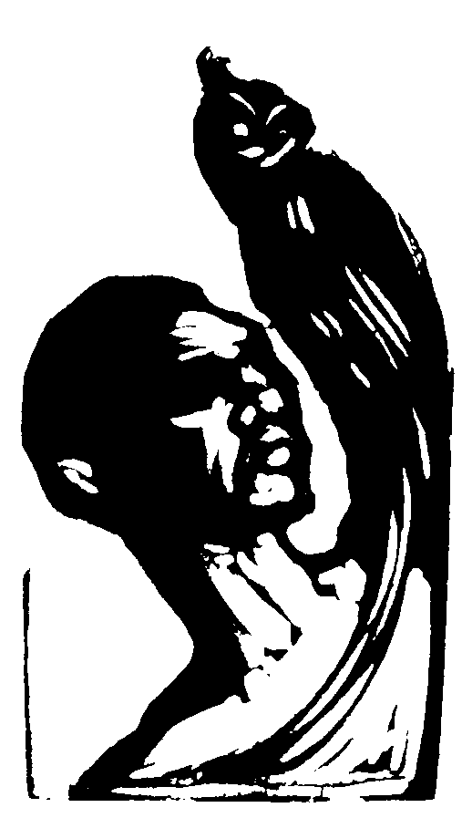 Bois gravé de Léon Dusouchet, illustrant "L'Horizon chimérique" de Jean de La Ville de Mirmont, Société littéraire de France, 1920